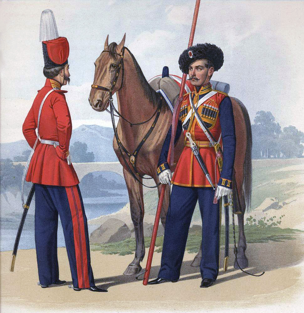 Рядовые Л.-Гв. Казачьего полка и Л.-Гв. Черноморского Казачьего дивизиона, 18 марта 1855. (В праздничной и парадной формах).